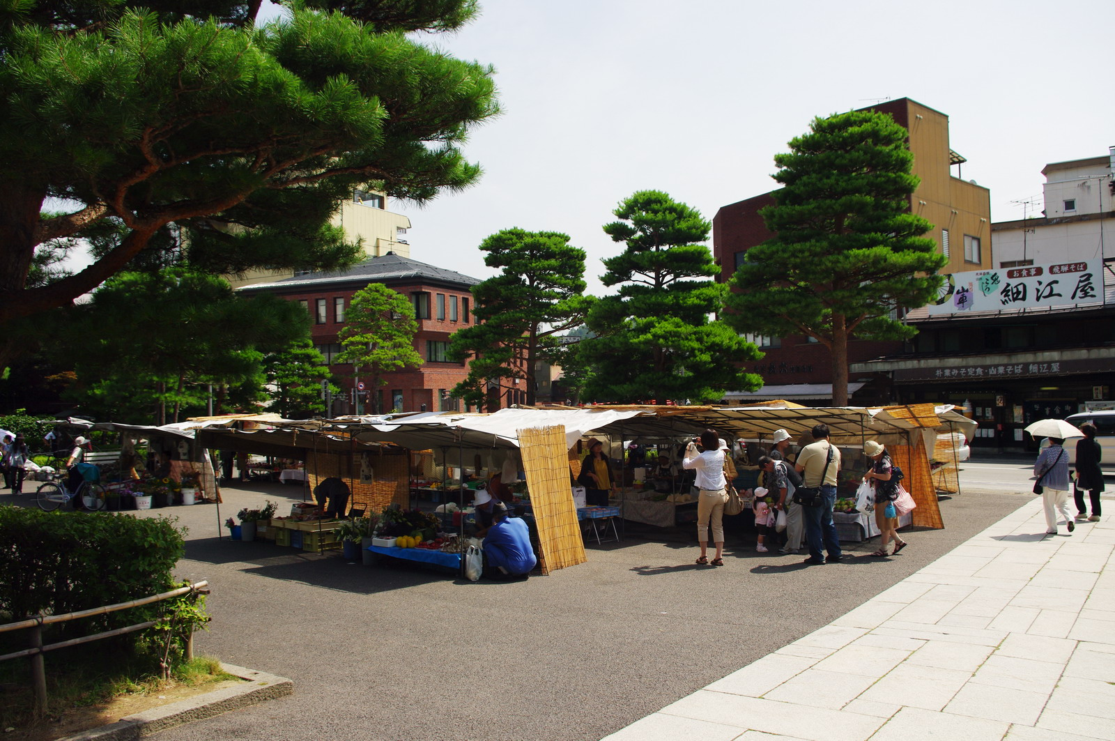 Morgenmarkt in Takayama